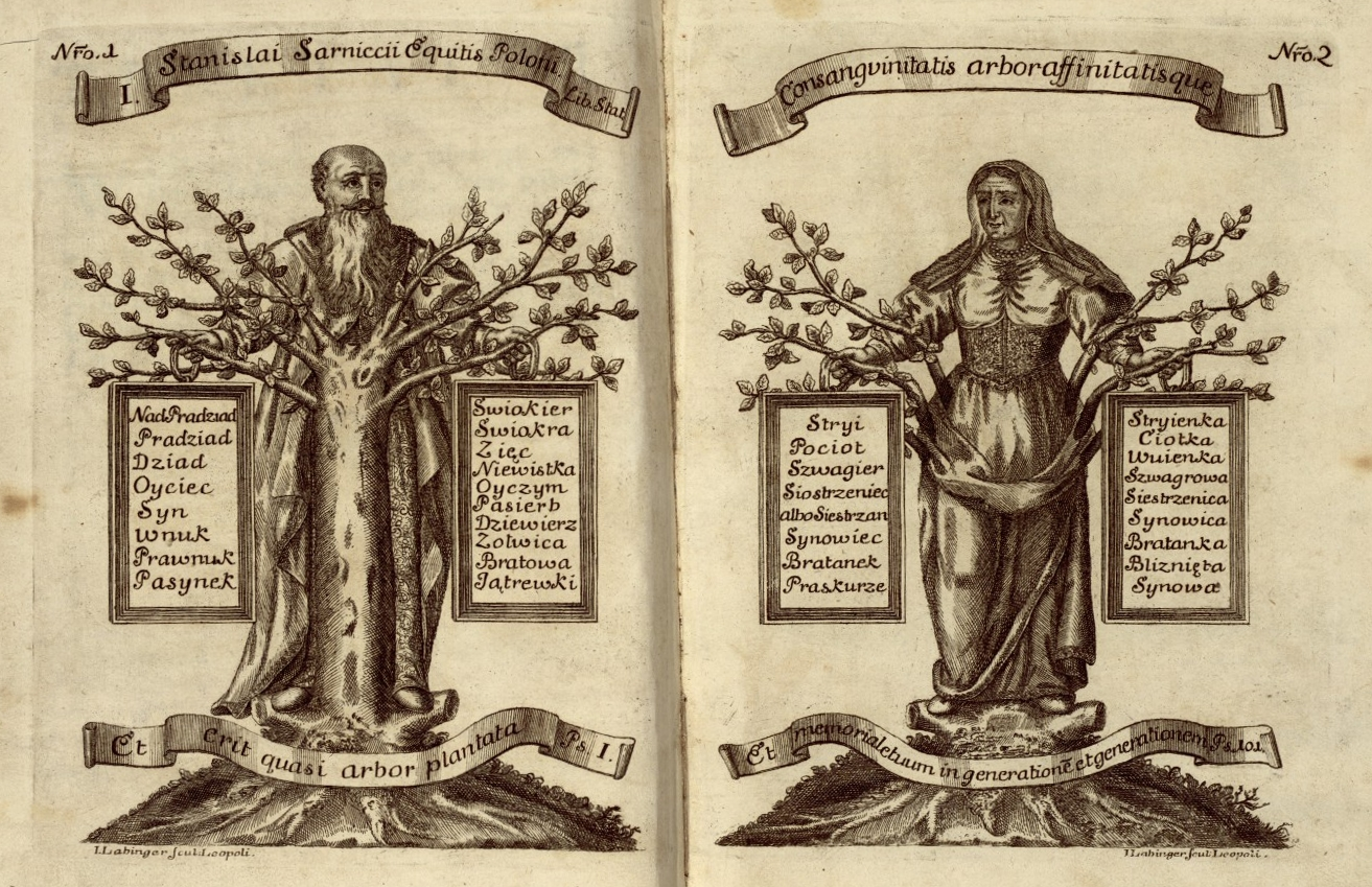 Józef Aleksander Jabłonowski, "Heraldica to iest osada kleynotow rycerskich y wiadomość znakow herbownych" 1742.